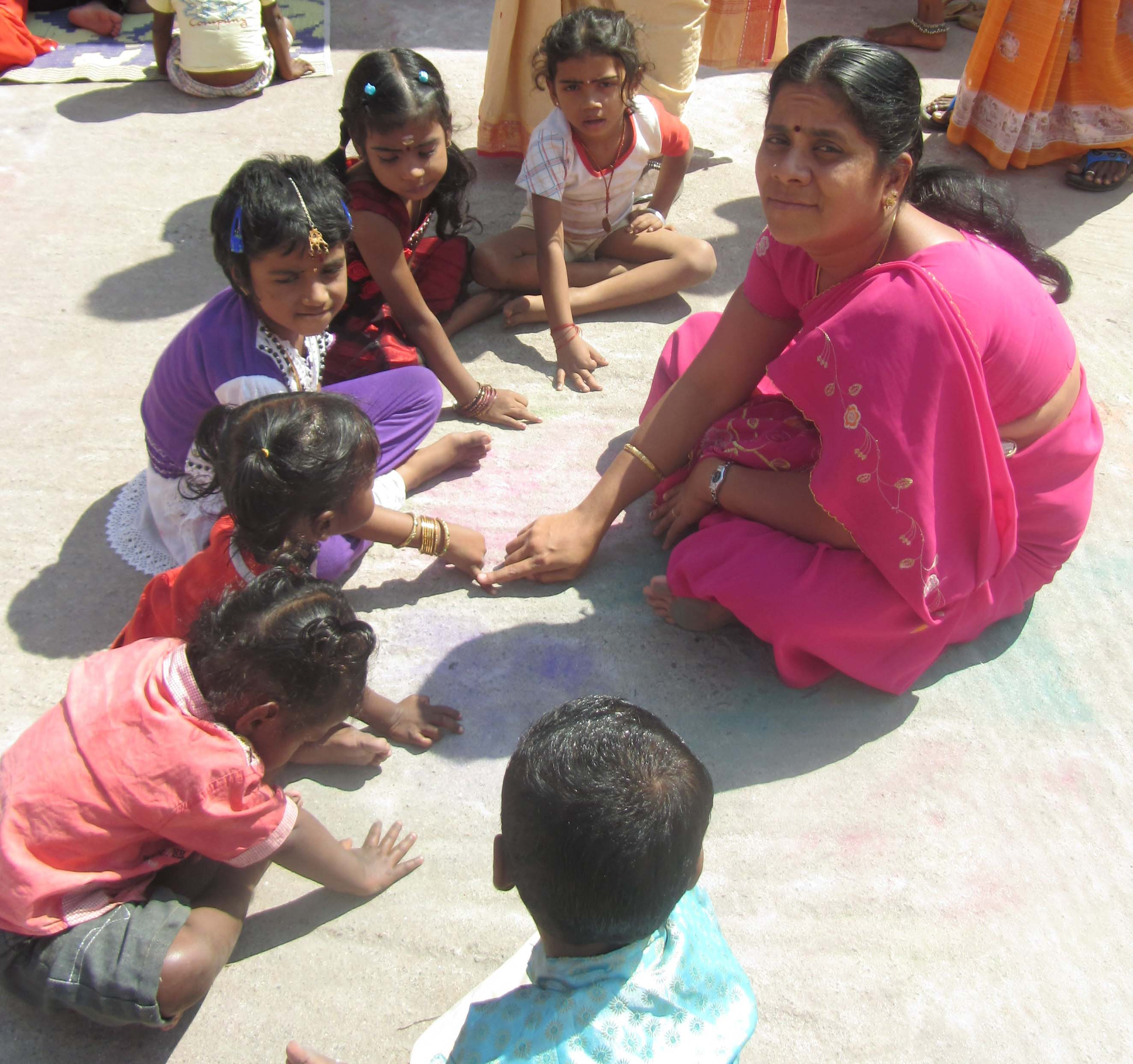 'ஓ ... சிய்யான்' விளையாட்டில் நடுவர் விரல்களை எண்ணுதல்